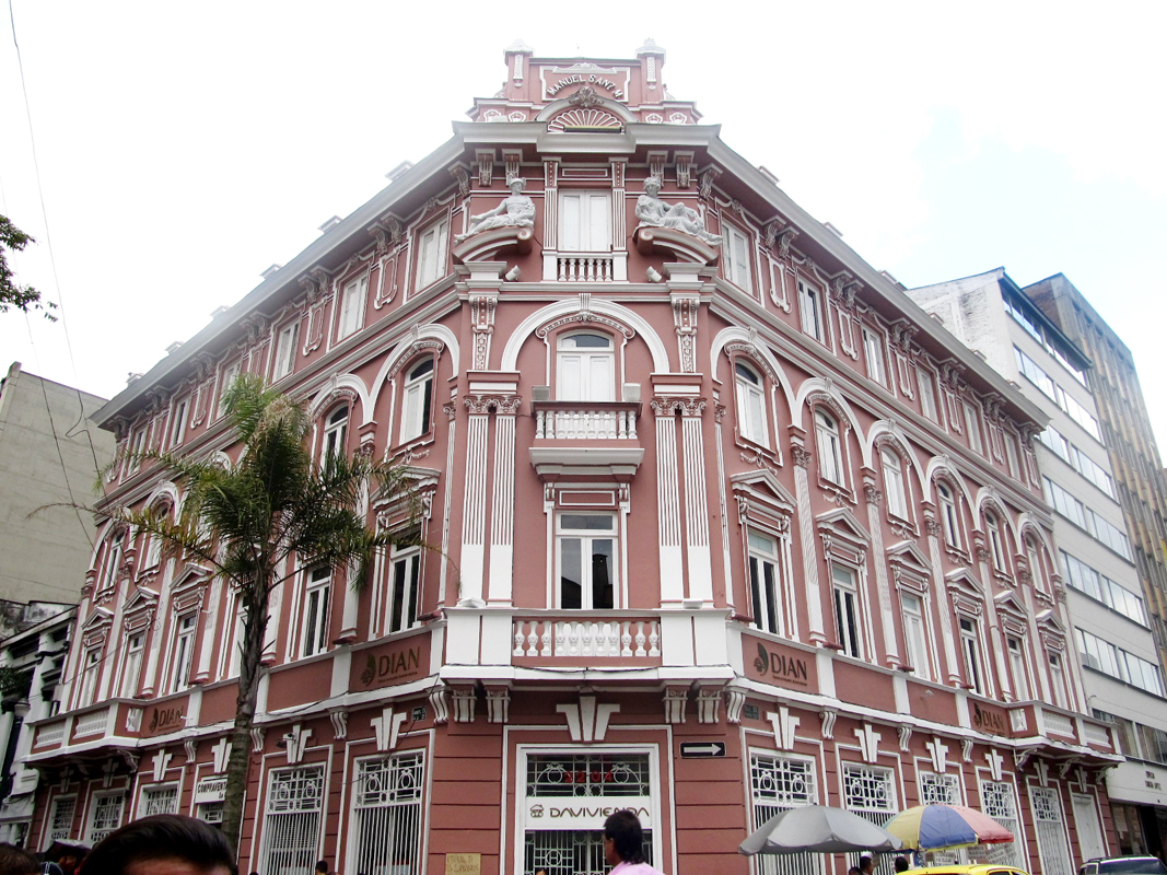 Edificio Sanz. Administración de Impuestos Nacionales.